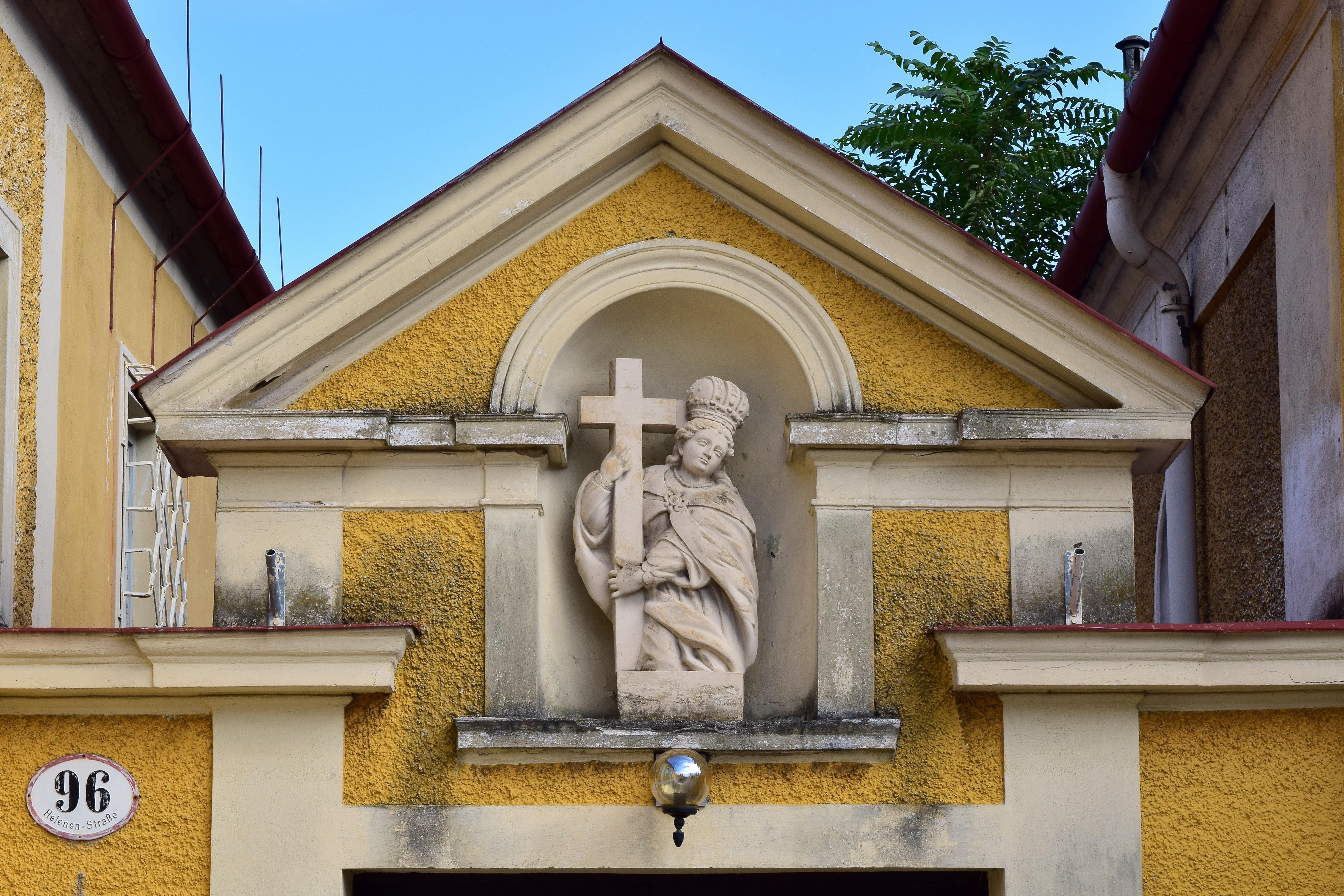 Pfarrhof